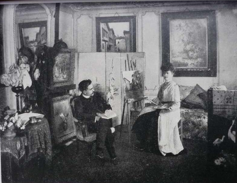 Jean et Marie de La Hire photographiés par Pierre Petit, vers 1905.